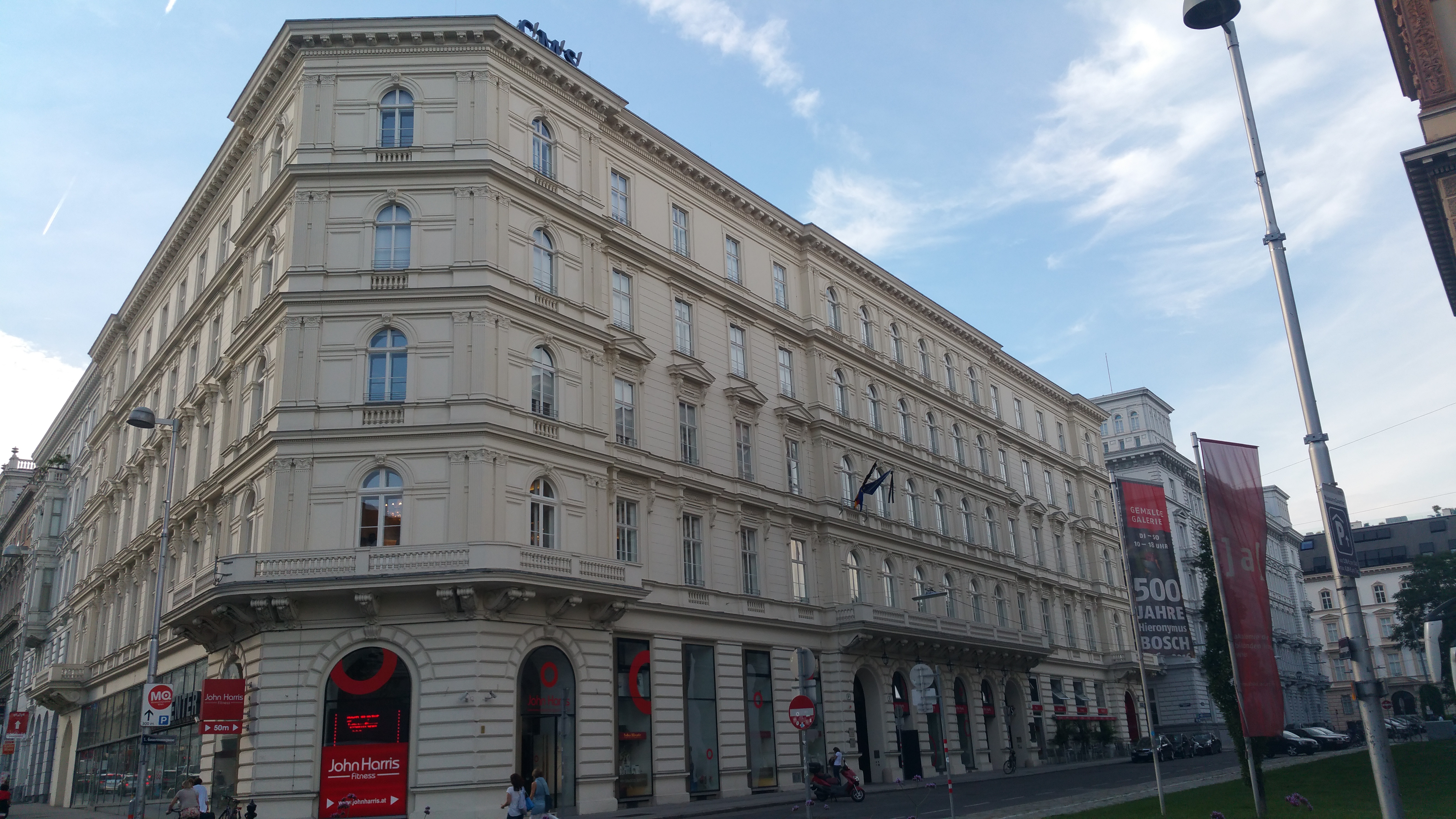 Eckhaus (1871-1872) von Romano und Schwendenwein, Gauermanngasse 2-4, Wien-Innere Stadt